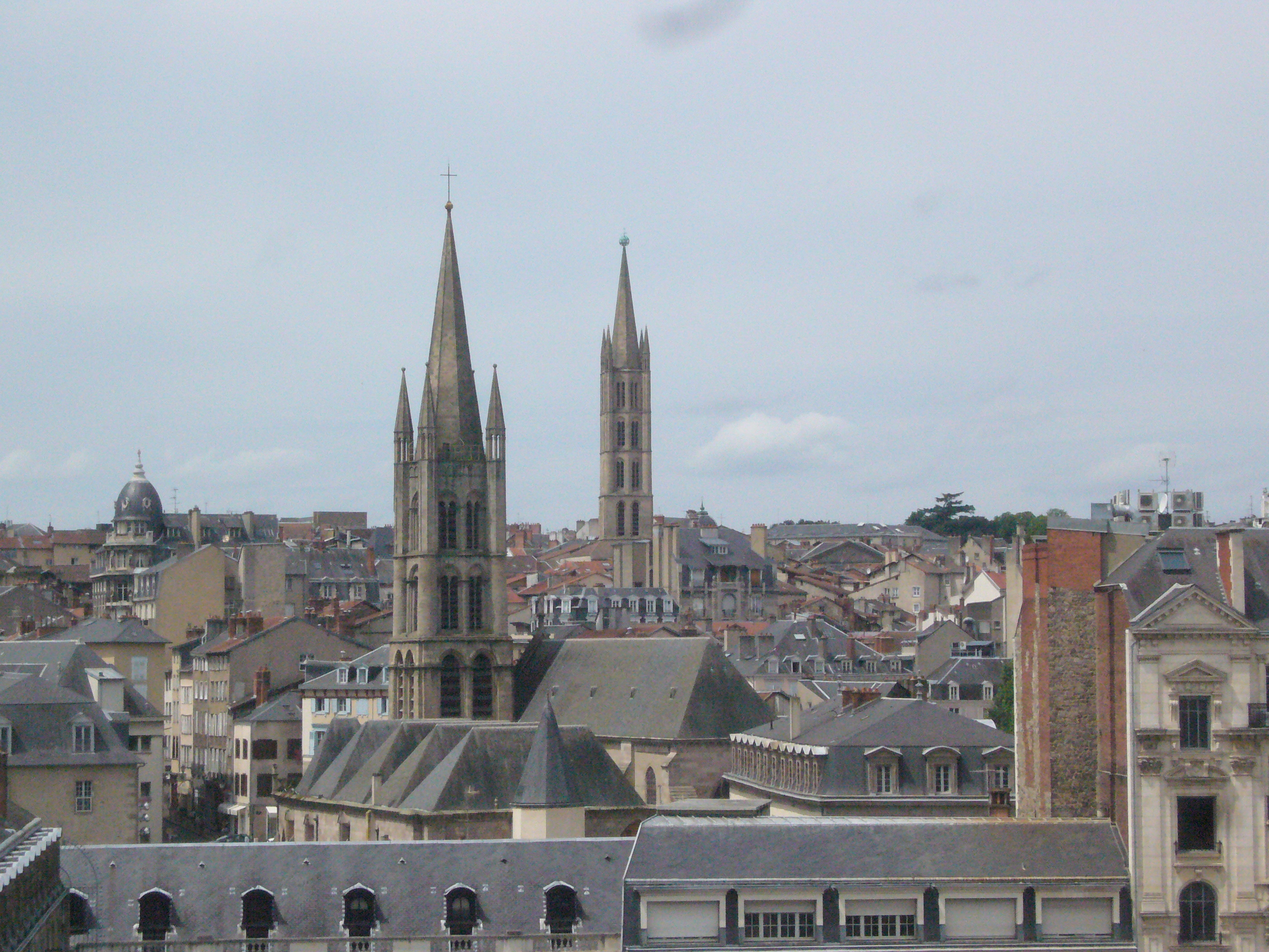 Vue du quartier historique et central dit "du Château", à Limoges, depuis le toit de la Chambre de commerce et d'industrie. On remarque notamment les clochers des églises Saint-Pierre (à g.) et Saint-Michel (à dr.), l'internat du lycée Gay-Lussac, les immeubles de la rue Jean-Jaurès, et au fond, le tribunal et les arbres du jardin d'Orsay.